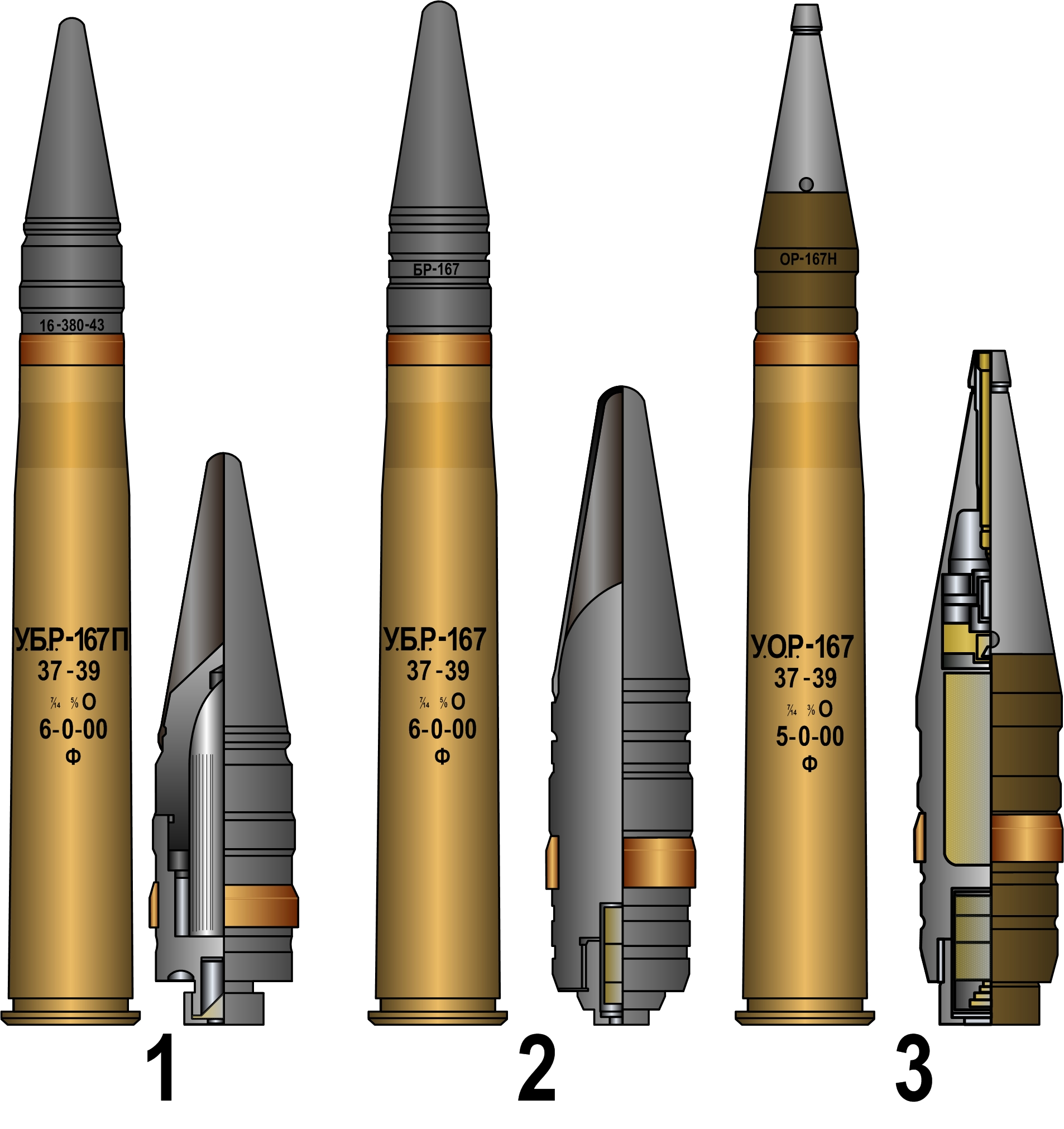 37мм снаряды зенитной пушки 61-К